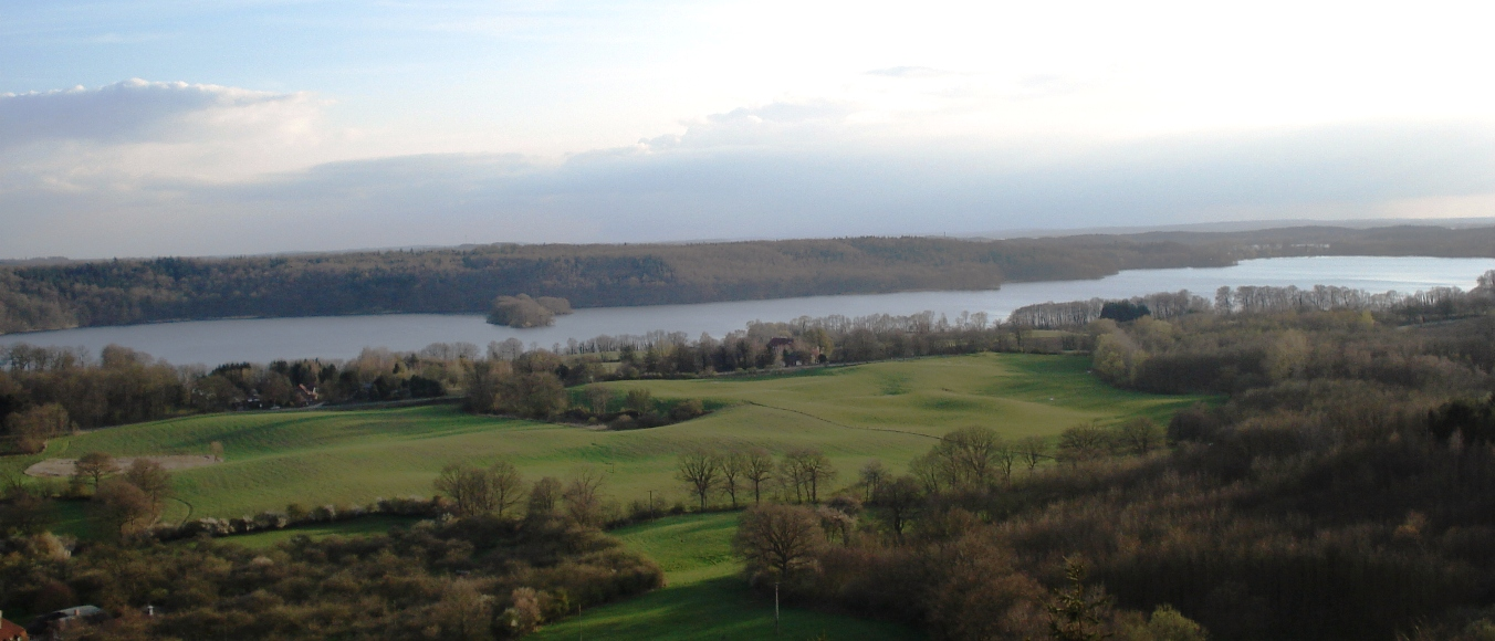 Der Dieksee